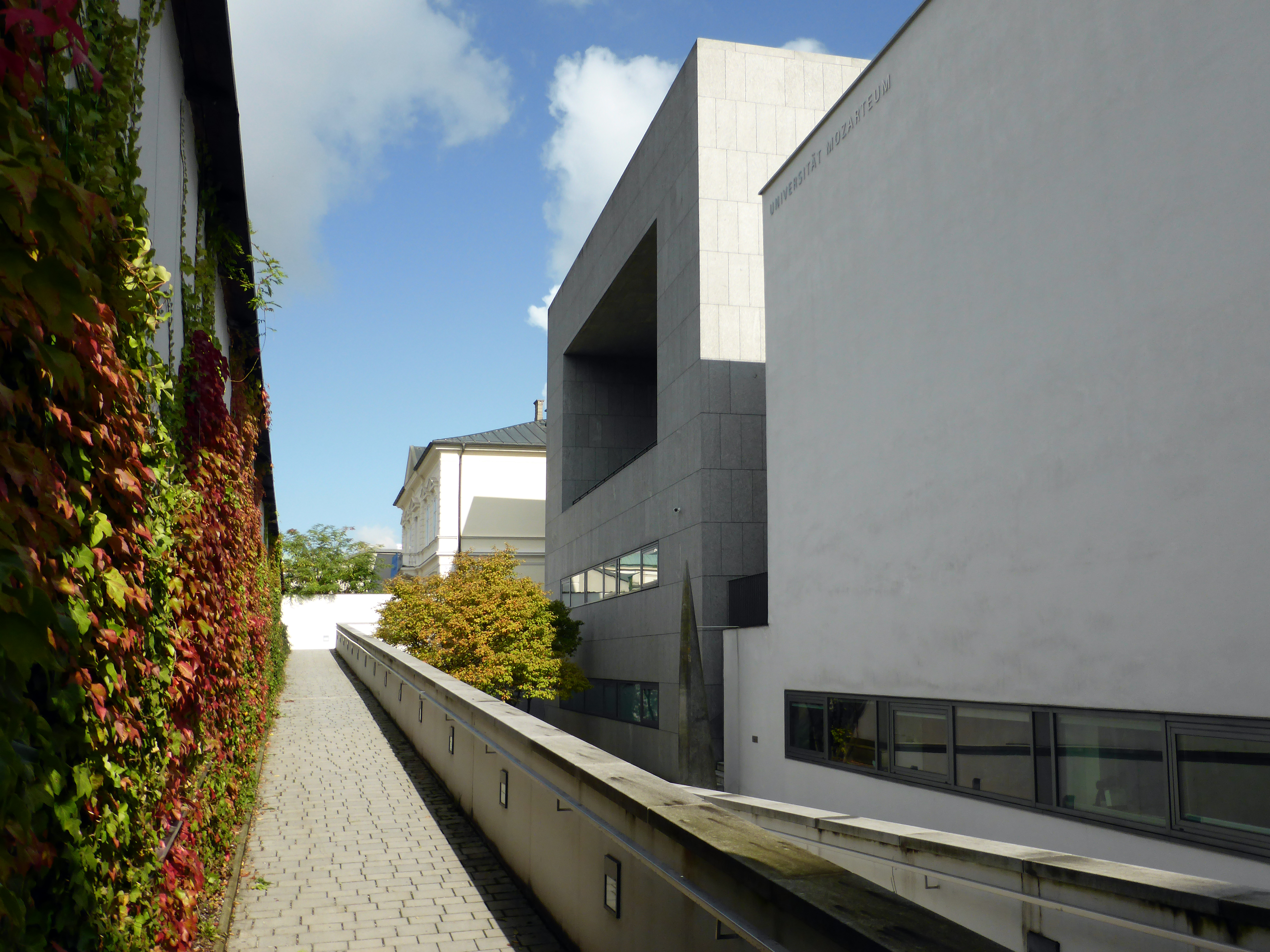 Neubau der Universität Mozarteum, Salzburg.